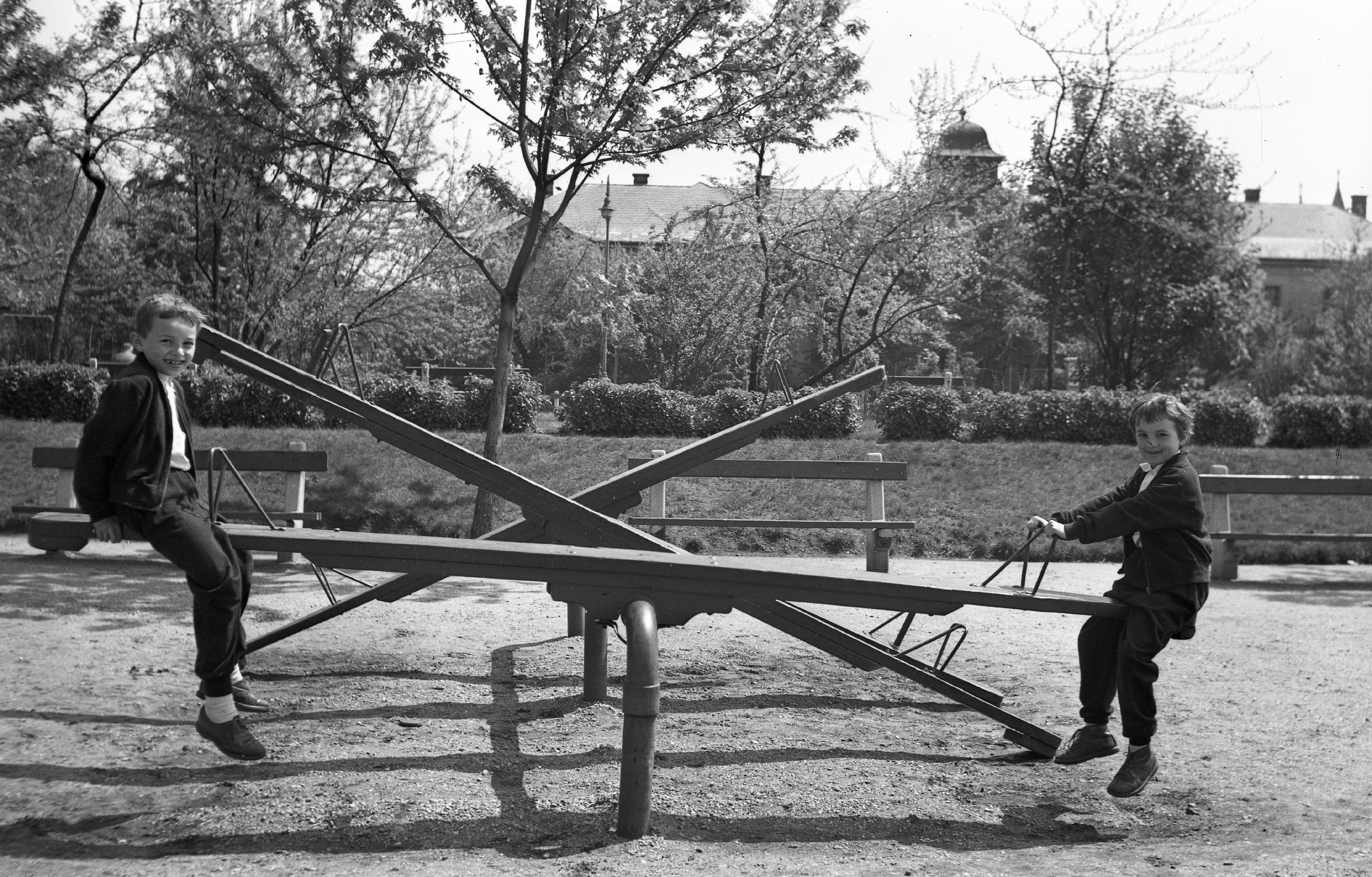 Páros gyerek portré a Gyöngyösi utca és a Babér utca közötti Munkásőr park (ma nincs külön neve a parknak). Háttérben a Madarász utcai gyermekkórház. Location: Hungary, Budapest XIII. Tags: Budapest Title: a Gyöngyösi utca és a Babér utca közötti Munkásőr park (ma nincs külön neve a parknak). Háttérben a Madarász utcai gyermekkórház.